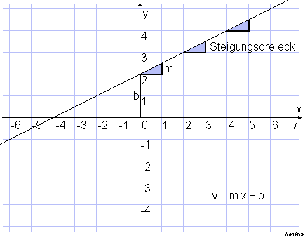 Schaubild: Lineare Funktion, GFDL gezeichnet von Honina 03:38, 17. Okt 2003 (CEST)